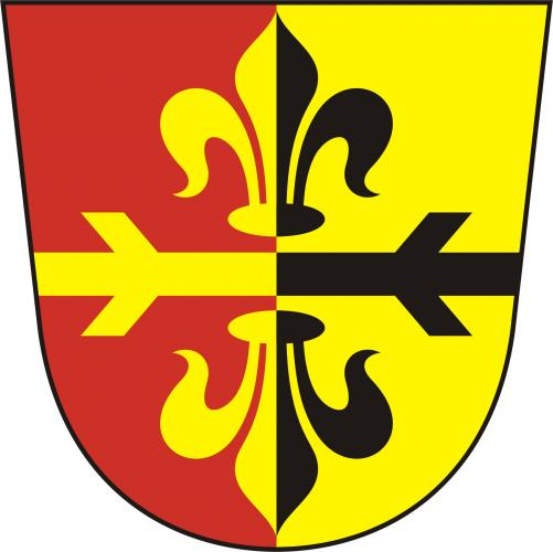 znak, Okna, okres Česká Lípa